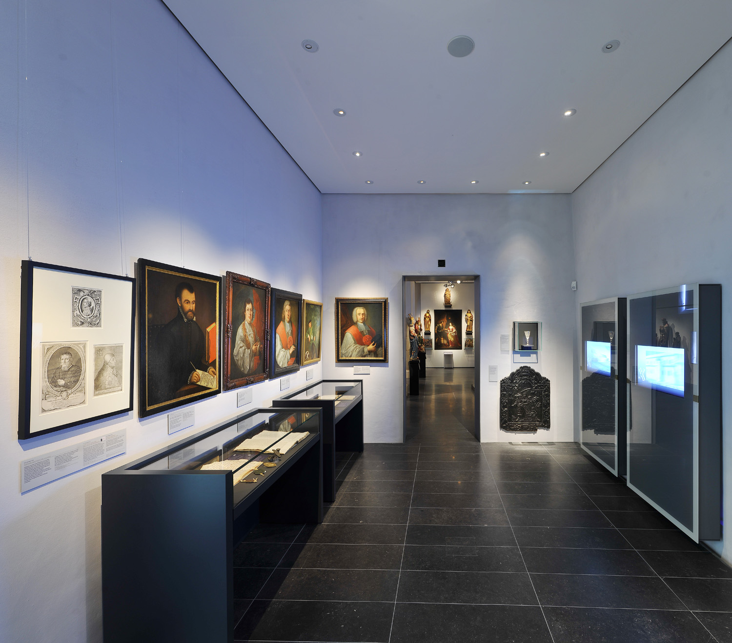 StiftsMuseum Xanten, Raum 4